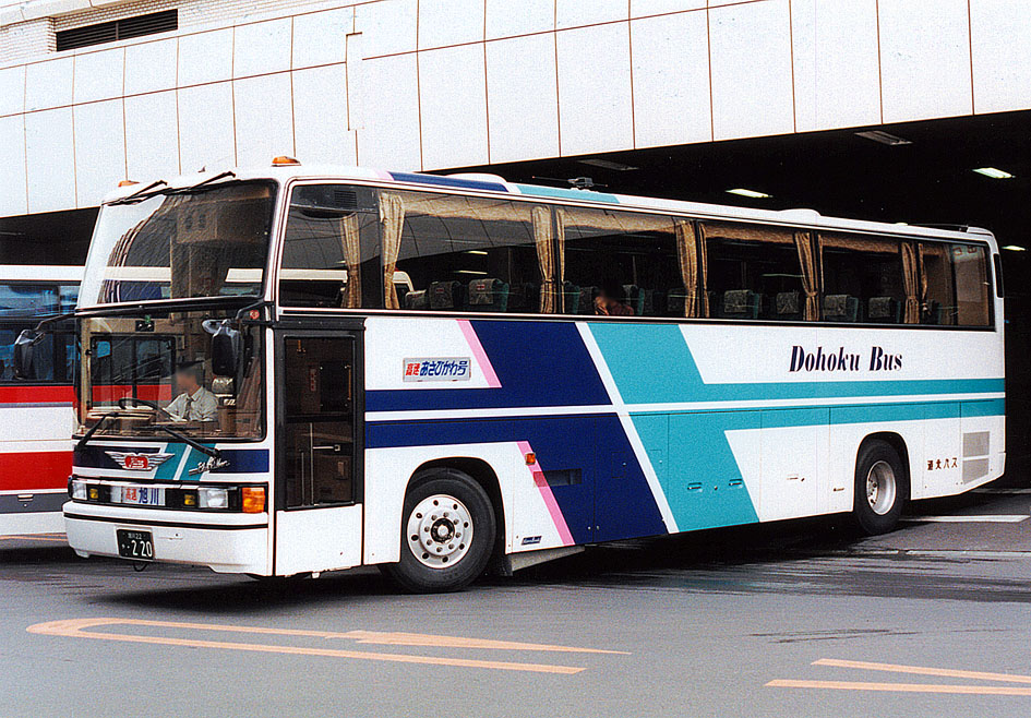 道北バス 高速あさひかわ号 日野・ブルーリボングランジェット